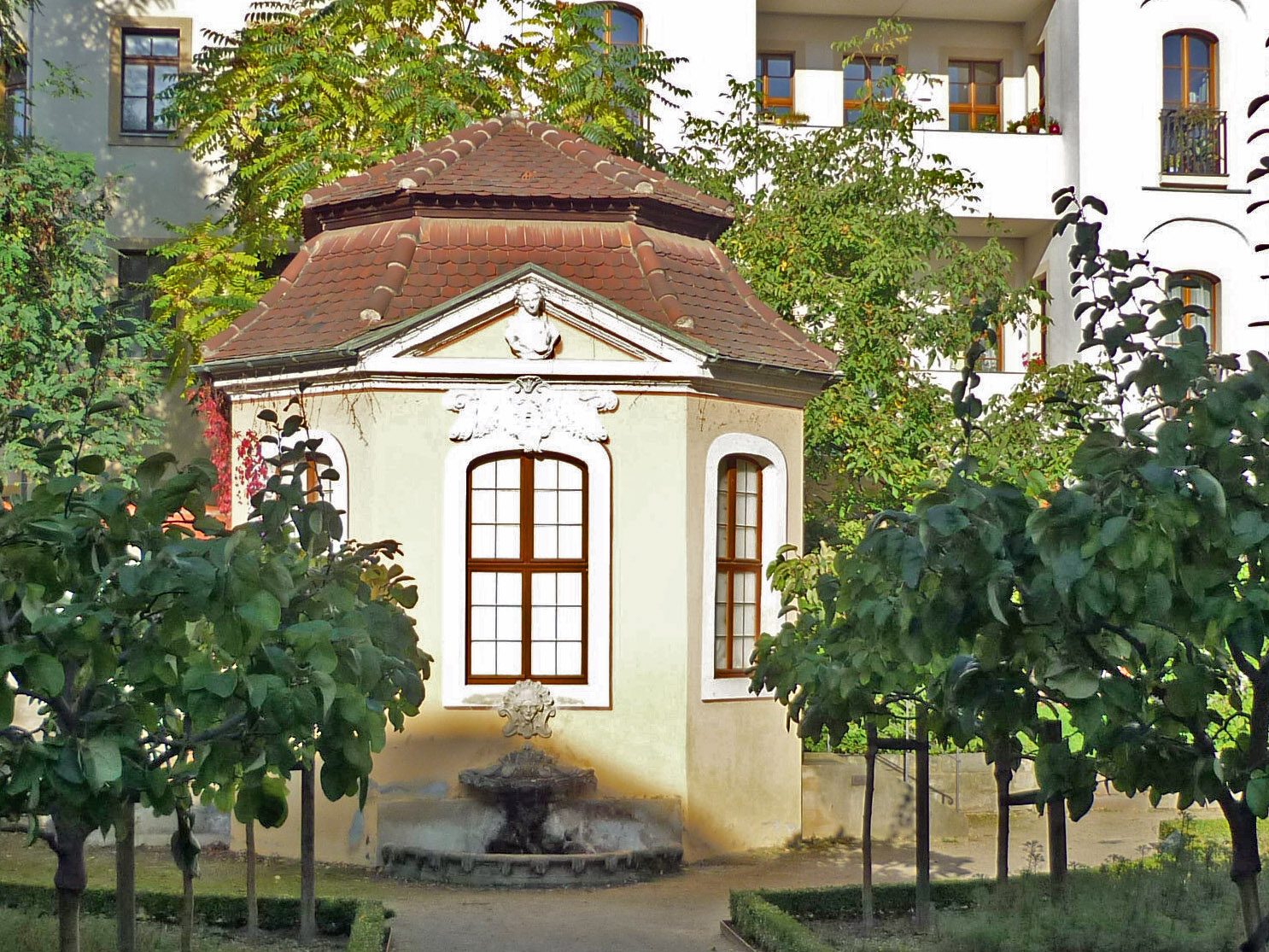 Pavillon in der Hauptstraße 22 in Dresden-Neustadt